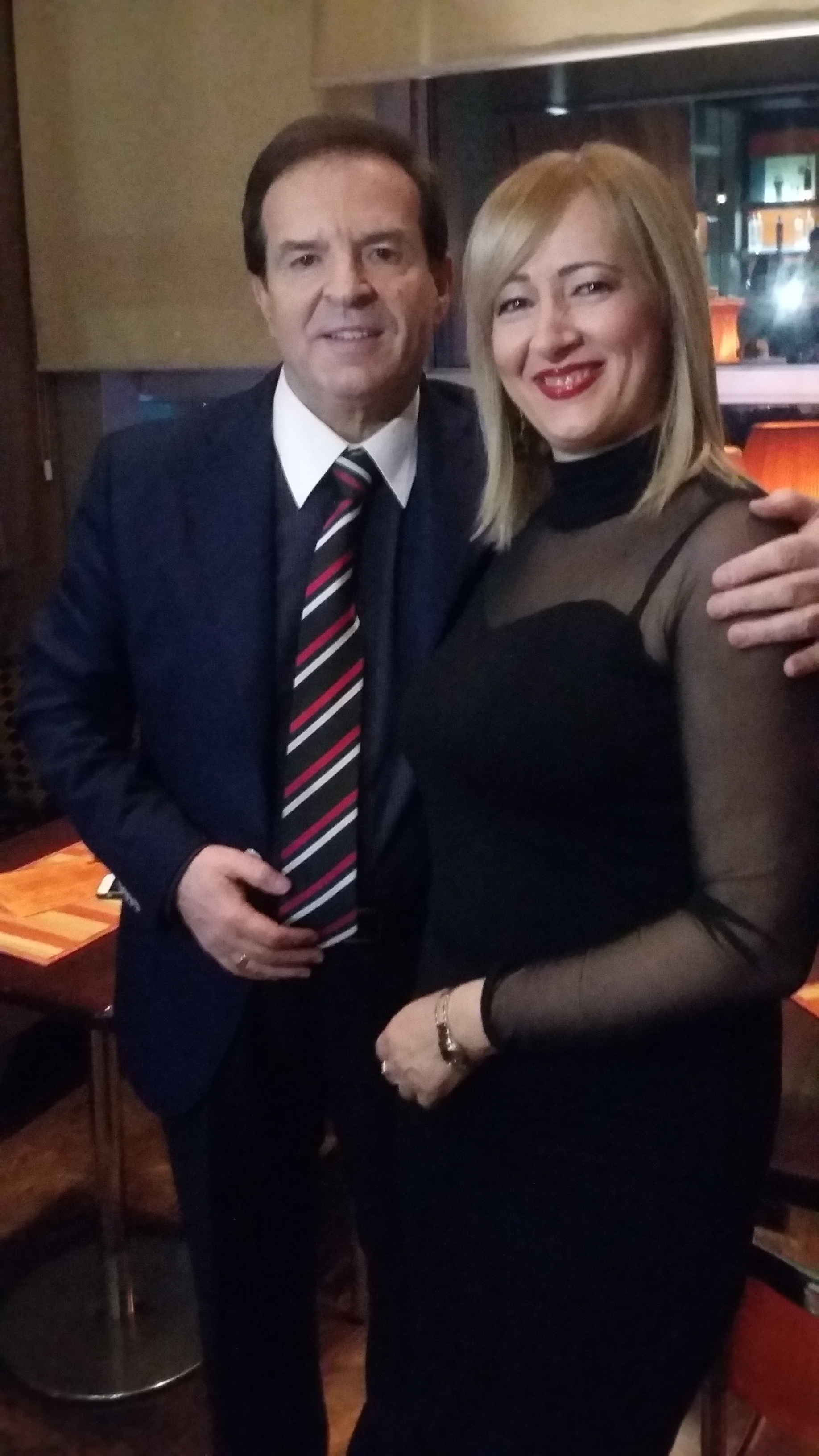 Srpski (latinica): Snezana Đorđević i Bogoljub Karić